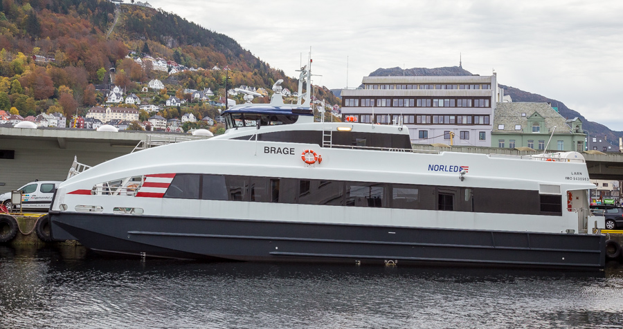 MS Brage ligger ved Munkebryggen, Bergen, i 2015.